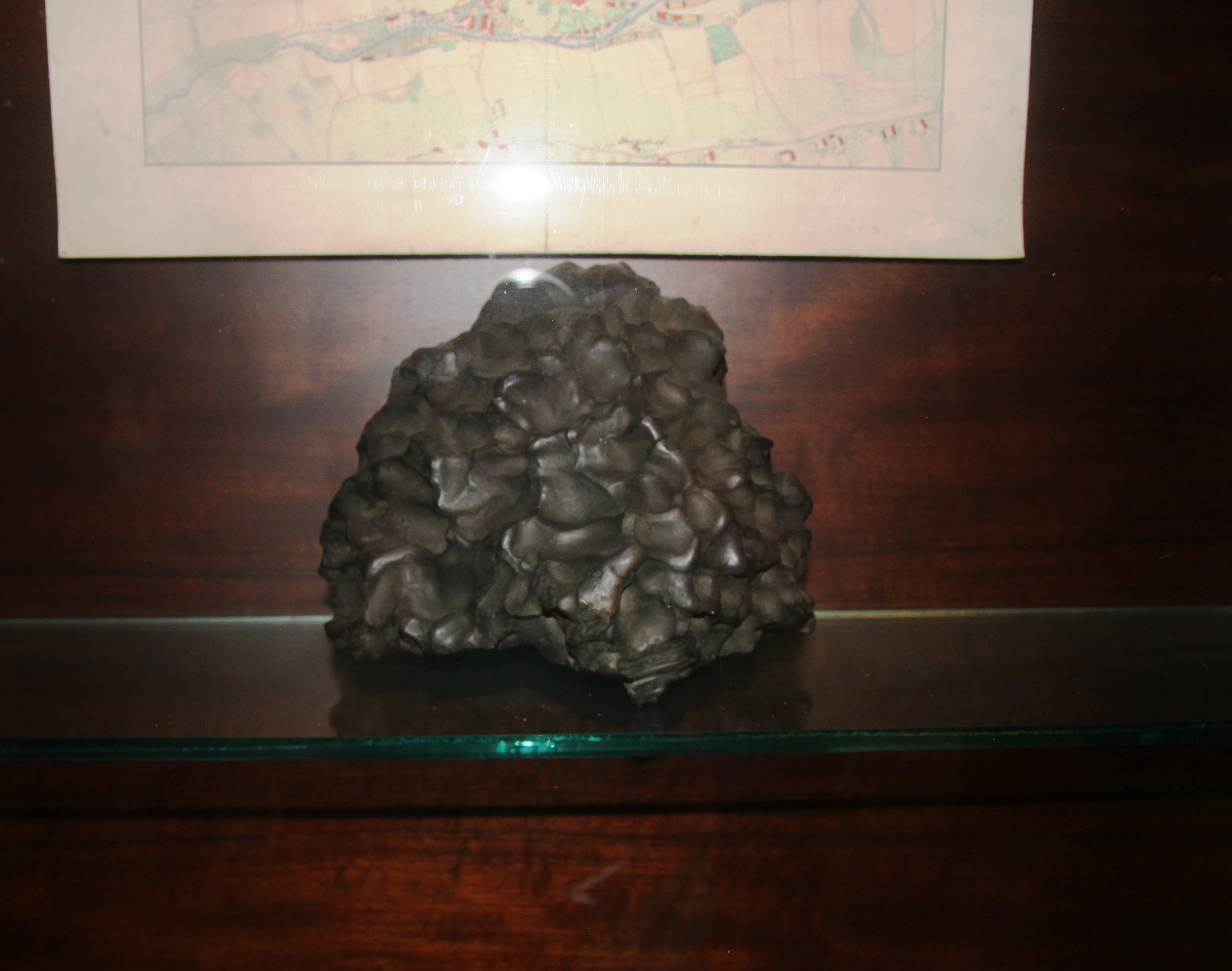 Kopie meteoritu uložena v muzeu v Broumově.